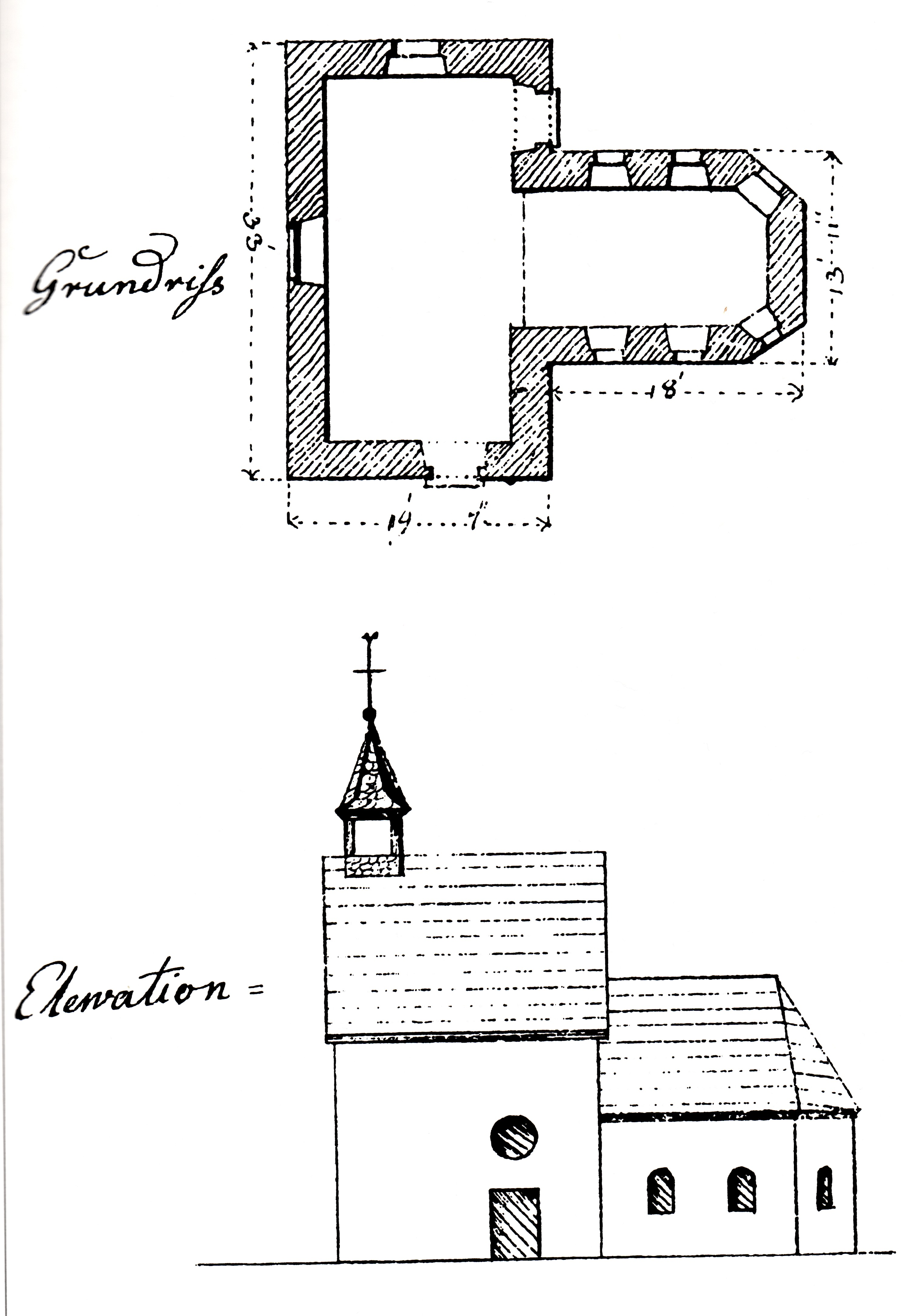 Grundriß und Seitenansicht der ca. 1820 abgebrochenen Essener St. Quintins-Kapelle